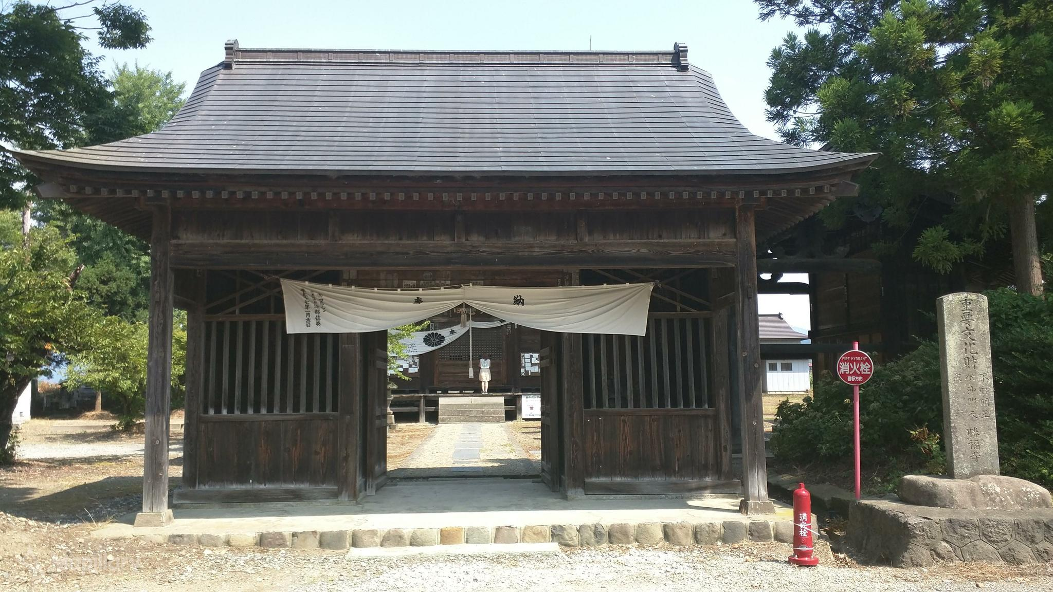 会津三十三観音 第6番札所 松島山勝福寺 仁王門